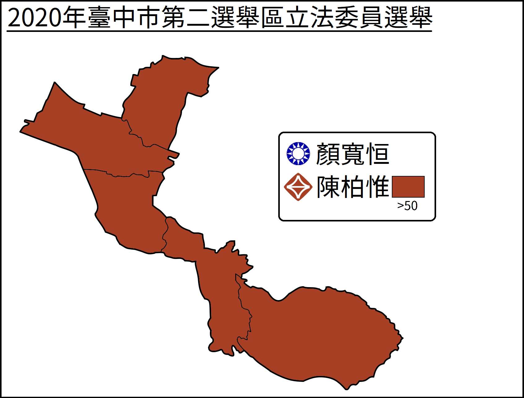 2020年立法委員選舉臺中市第二選舉區